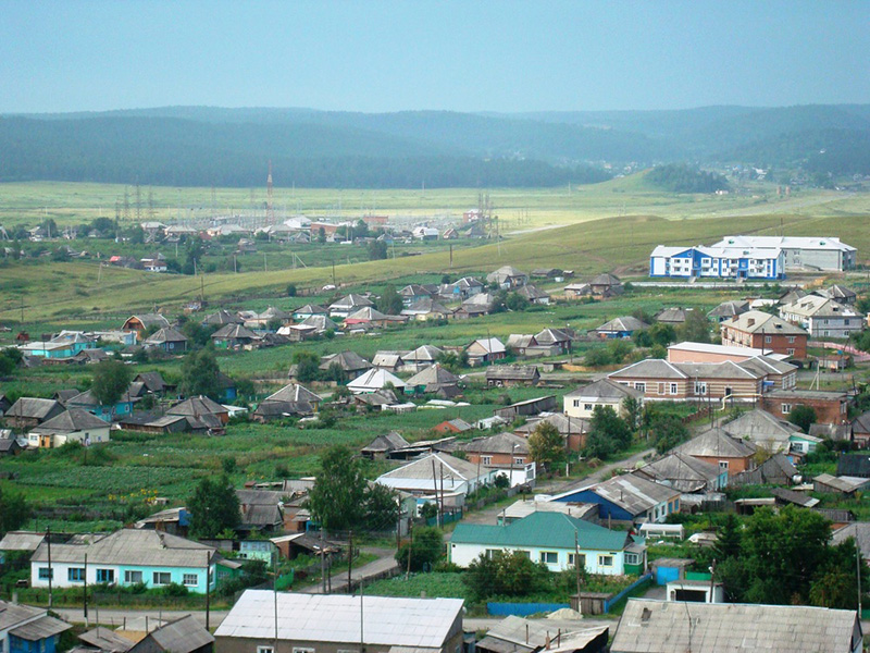 Старобачаты — посёлок в Беловском районе Кемеровской области.